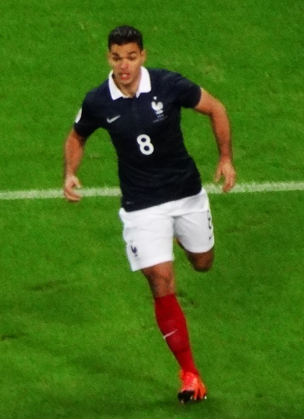 France midfielder Hatem ben Arfa races past England midfielder Dele Alli